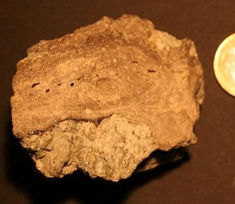 Köfelsit; Euromünze als Maßstab